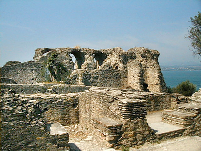 Sirmione, Lombardia, Italia. Grotte di Catullo